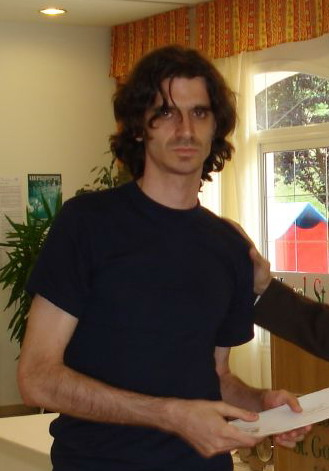 Gabriel del Rio (3r classificat), XXV Open Internacional d'Andorra 2007. Hotel St Gothard, Erts La Massana. Cloenda.